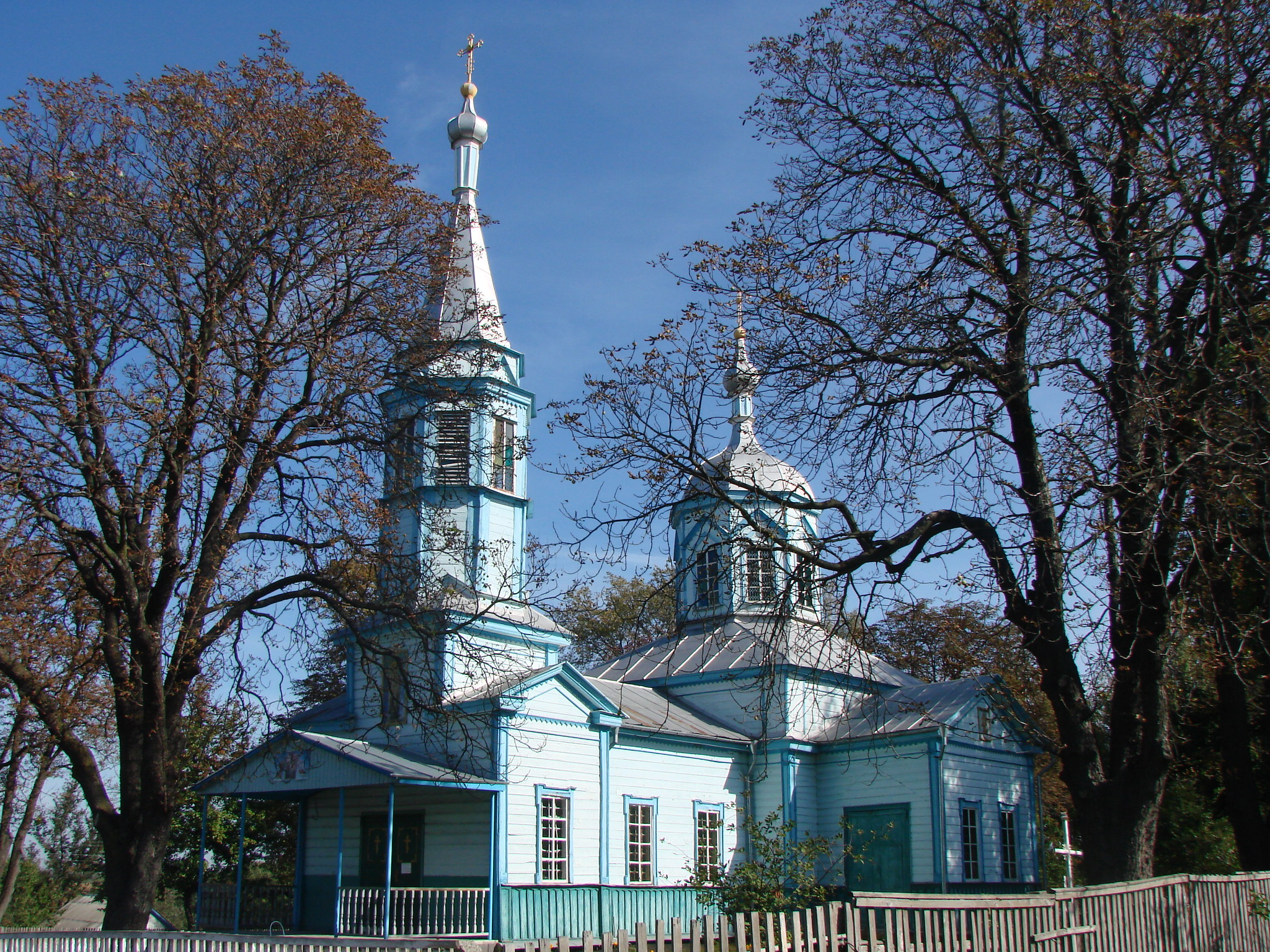 Свято-Миколаївська церква в селі Кадомка